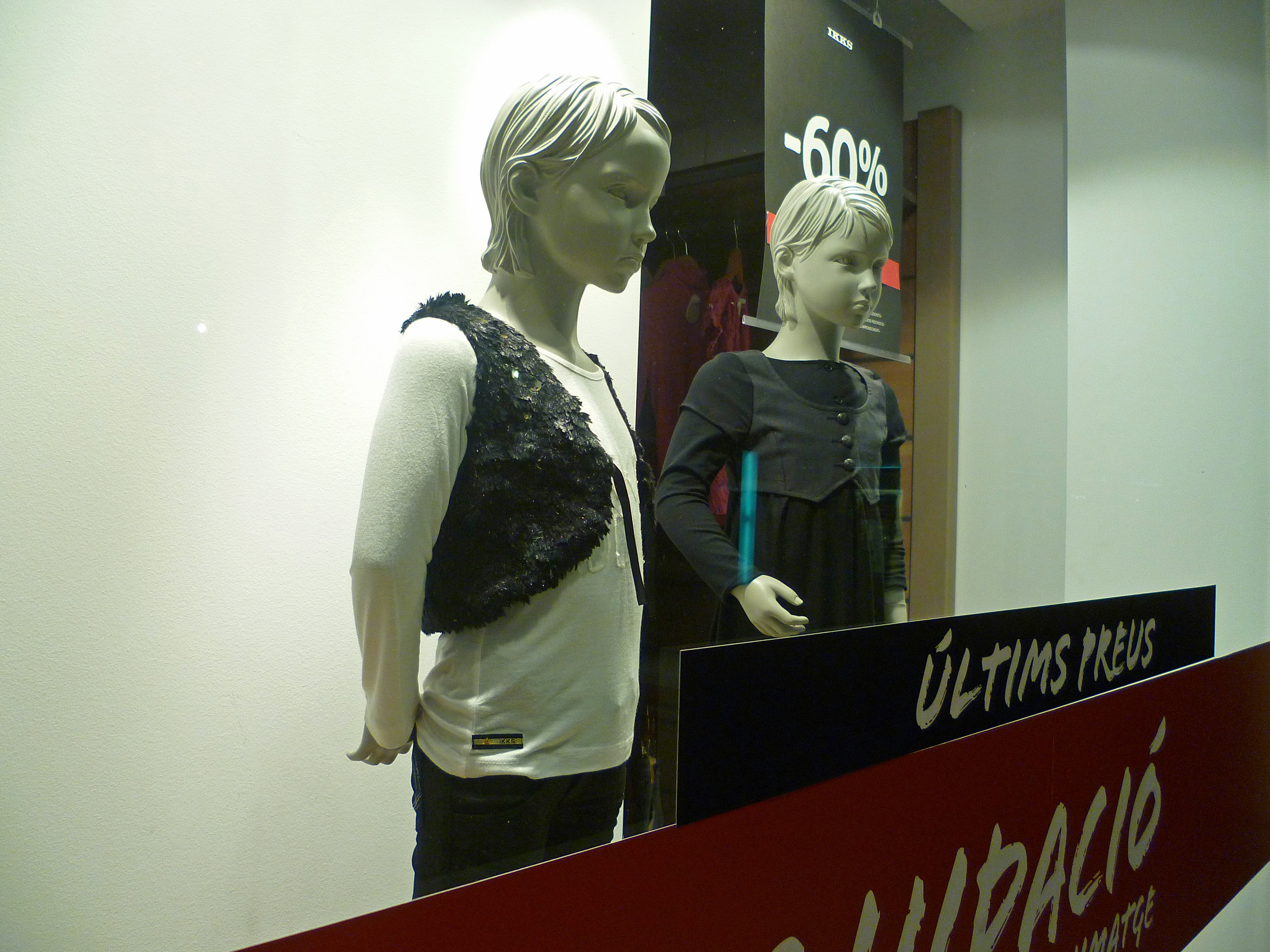 Girona (Catalunya, Espanya) : Tenda IKKS, rambla de la Llibertat.